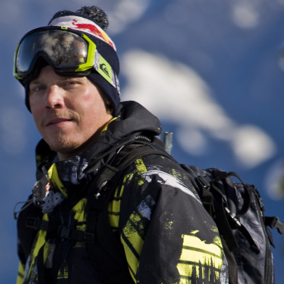 Waking at the 2010 World Heli Challenge.